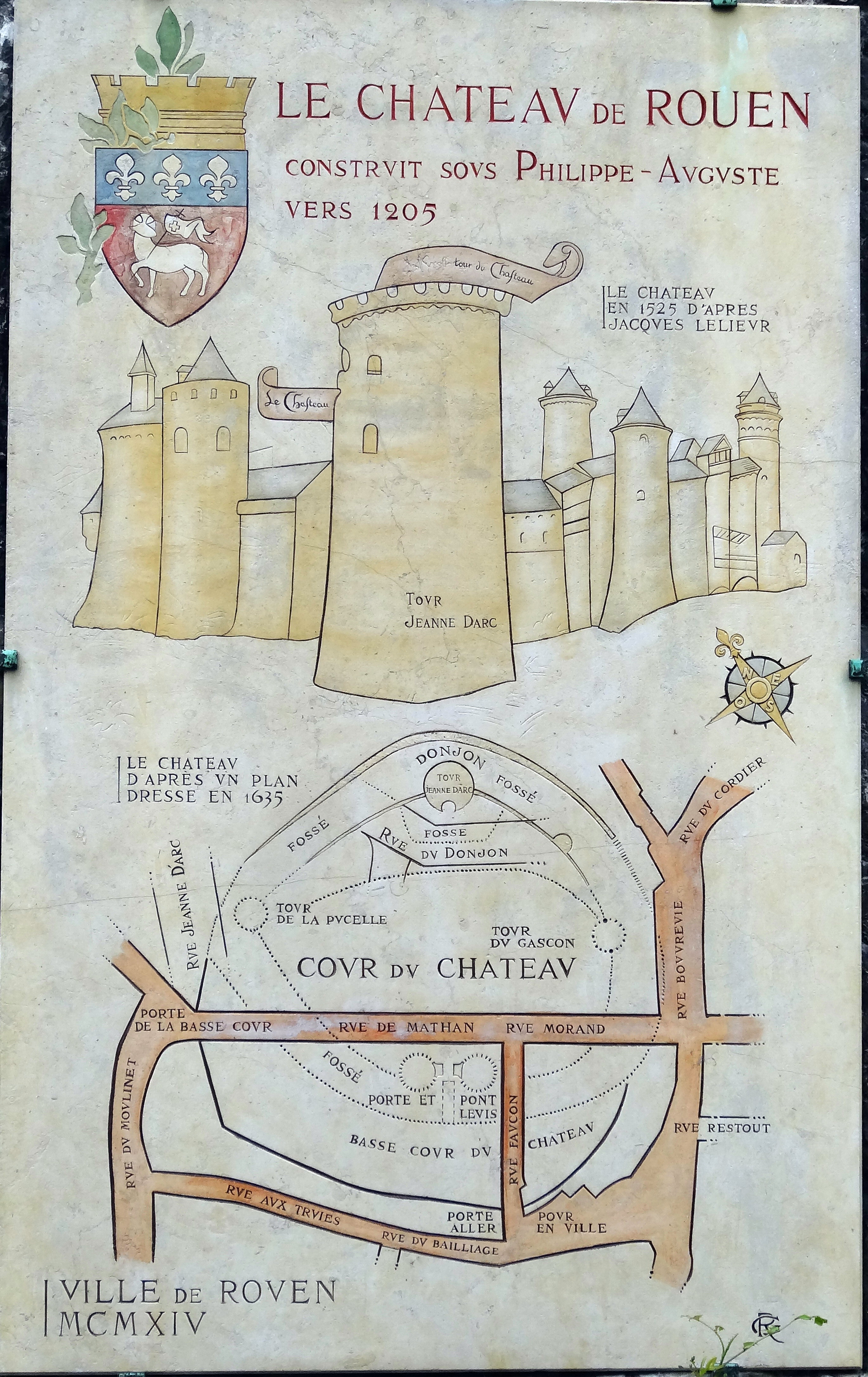 Le Château de Rouen (1205) (Haute-Normandie)